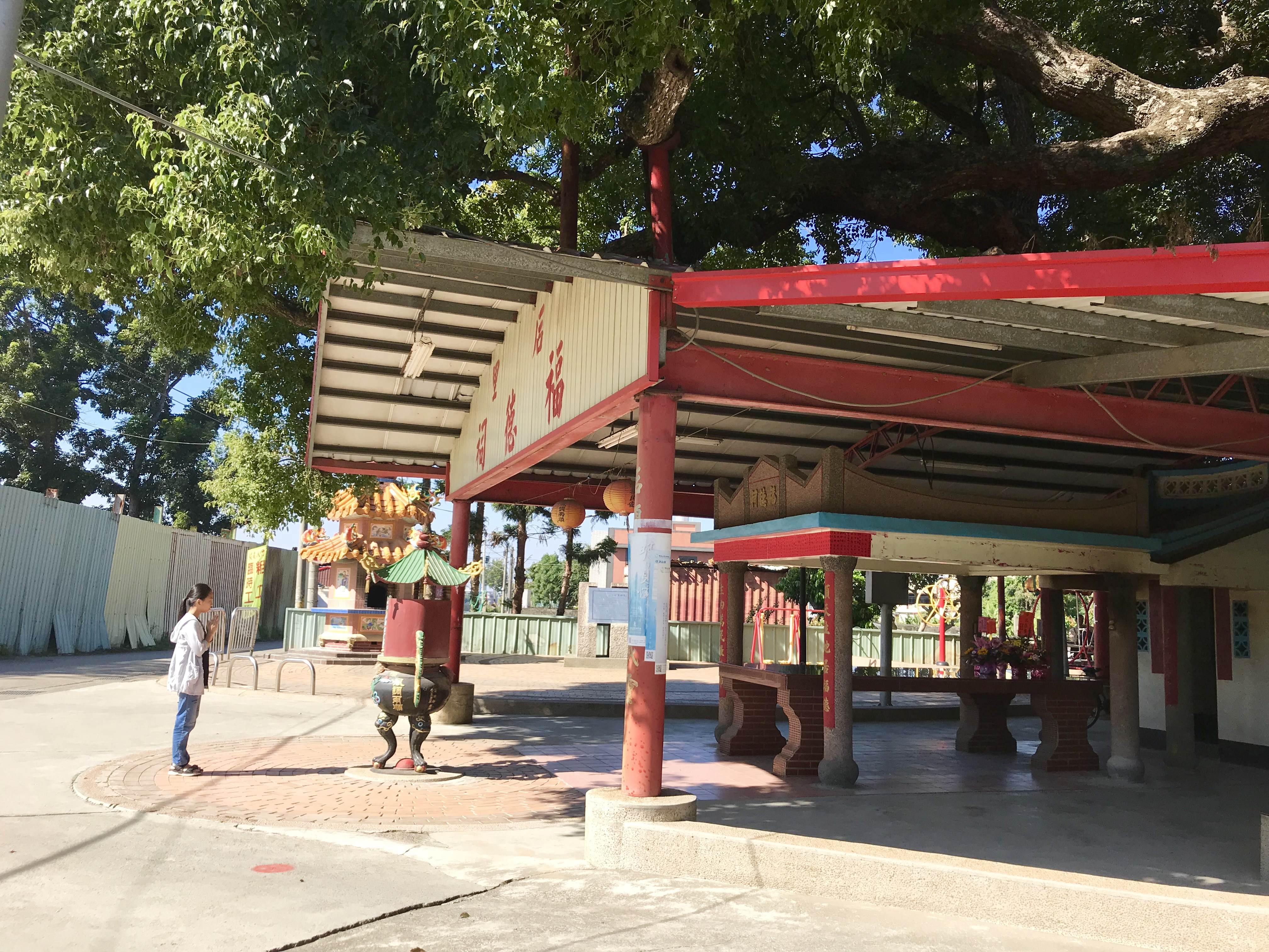 中文（台灣）: 日月神木下的后里福德祠